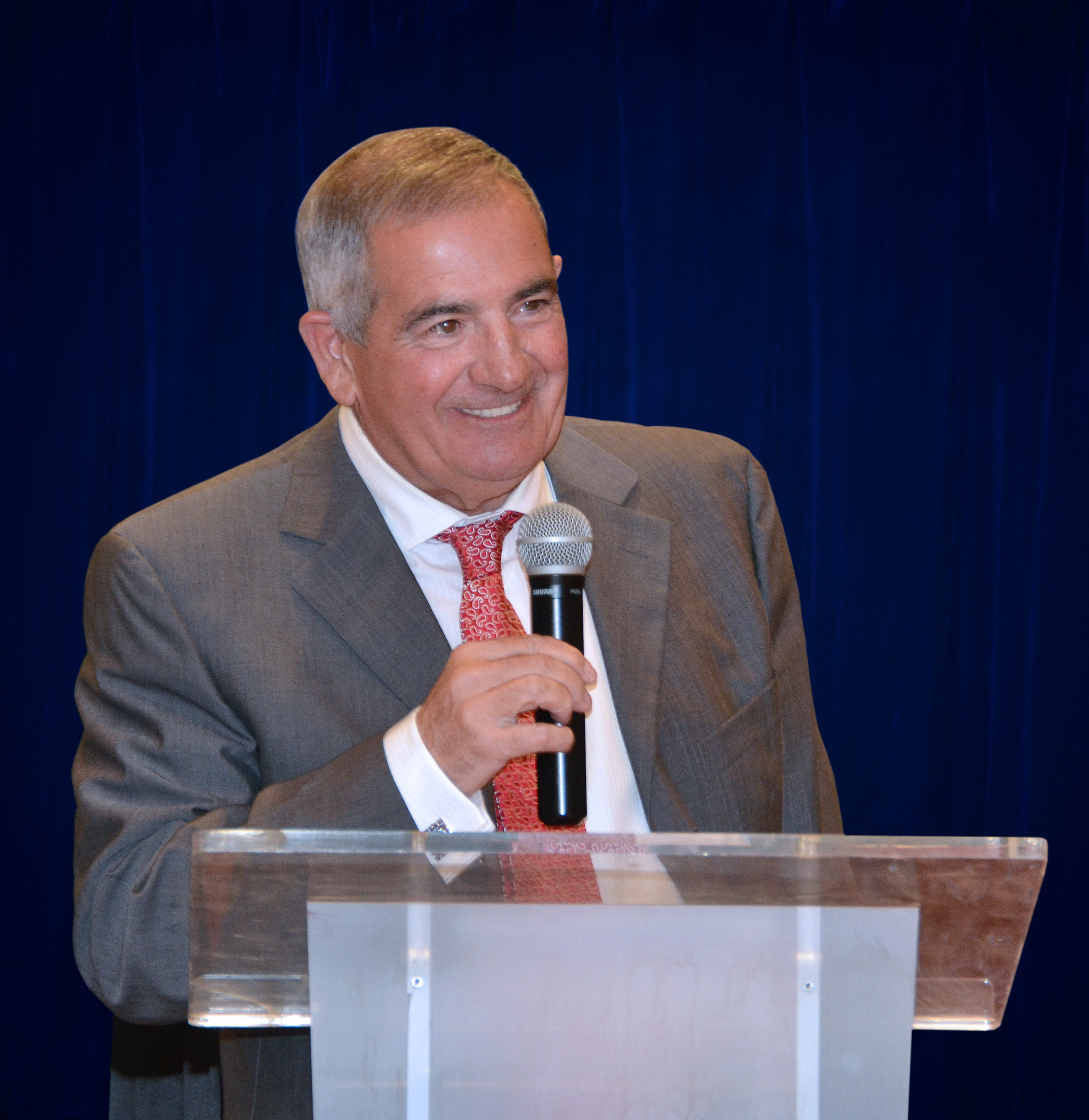 Fotografía de Andreu Pi Pocurull durante la II Convención Internacional del Grupo ICG.